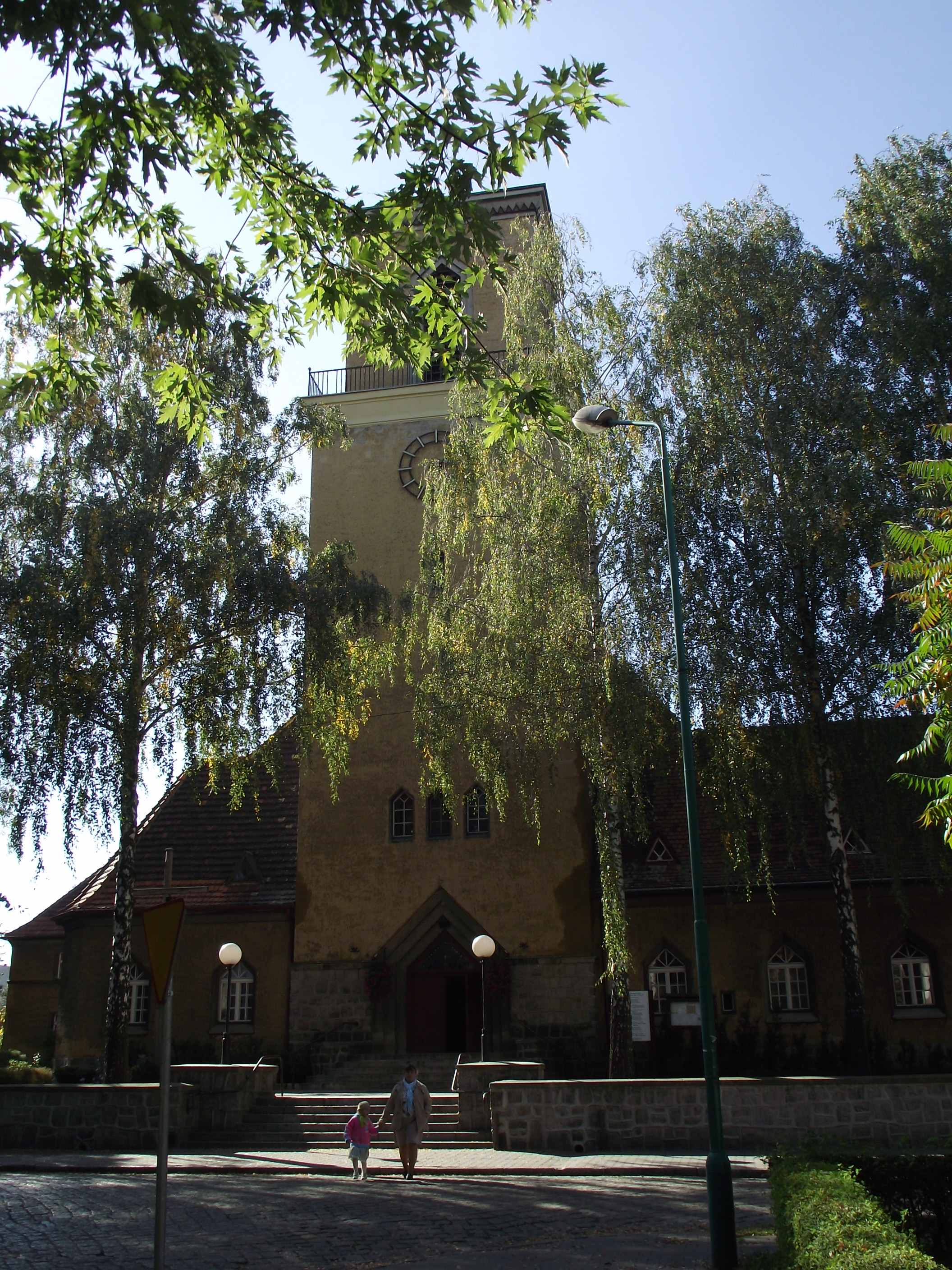 Zbąszynek, ul. Długa 29/30 - dawny kościół ewangelicki, ob. rzymskokatolicki parafialny p.w. Macierzyństwa NMP, mur., 1928-1929